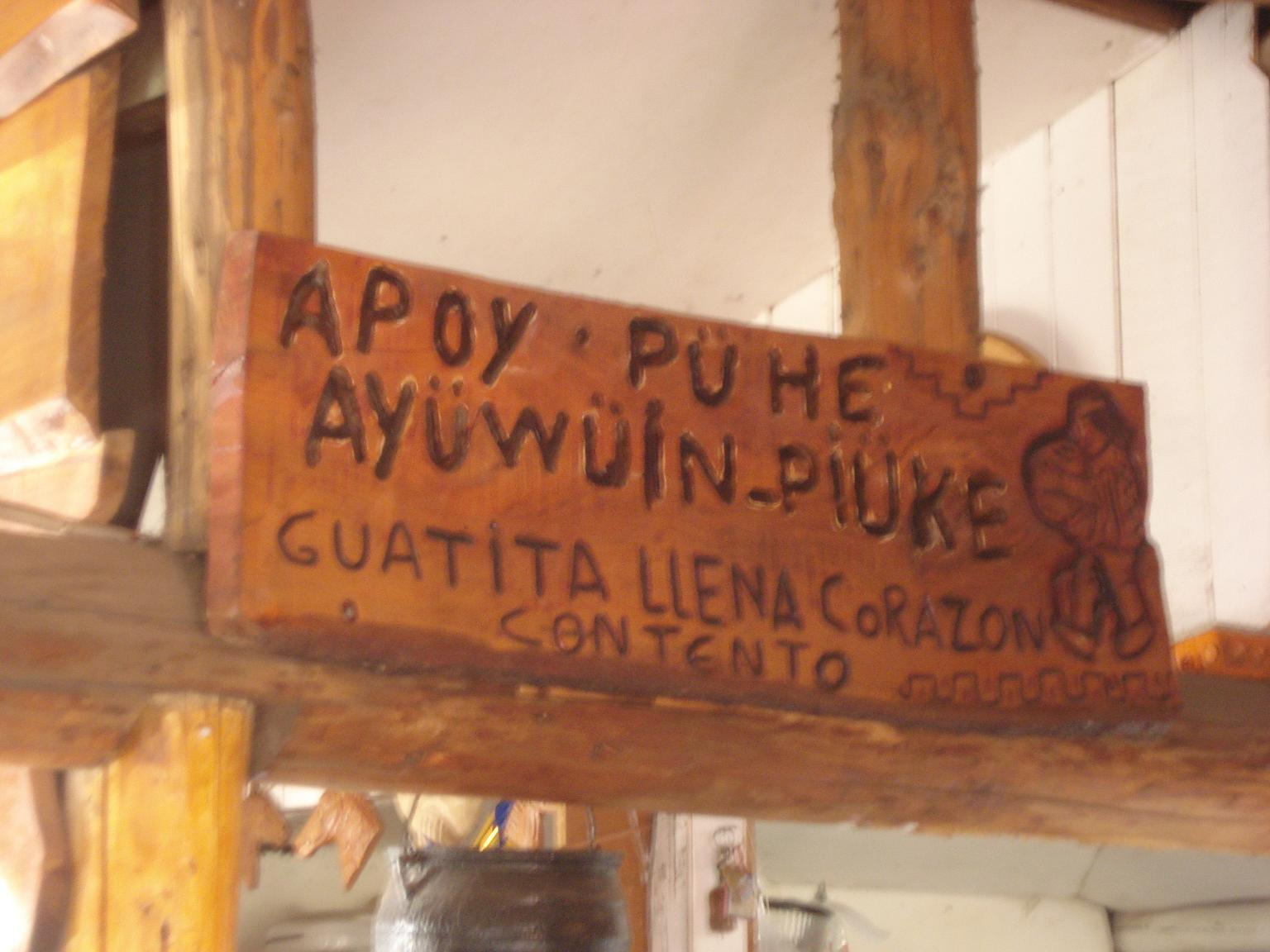 Letrero escrito en mapudungun "apoy pühe ayüwüin piüke" = "güatita (estomago) llena corazón contento".